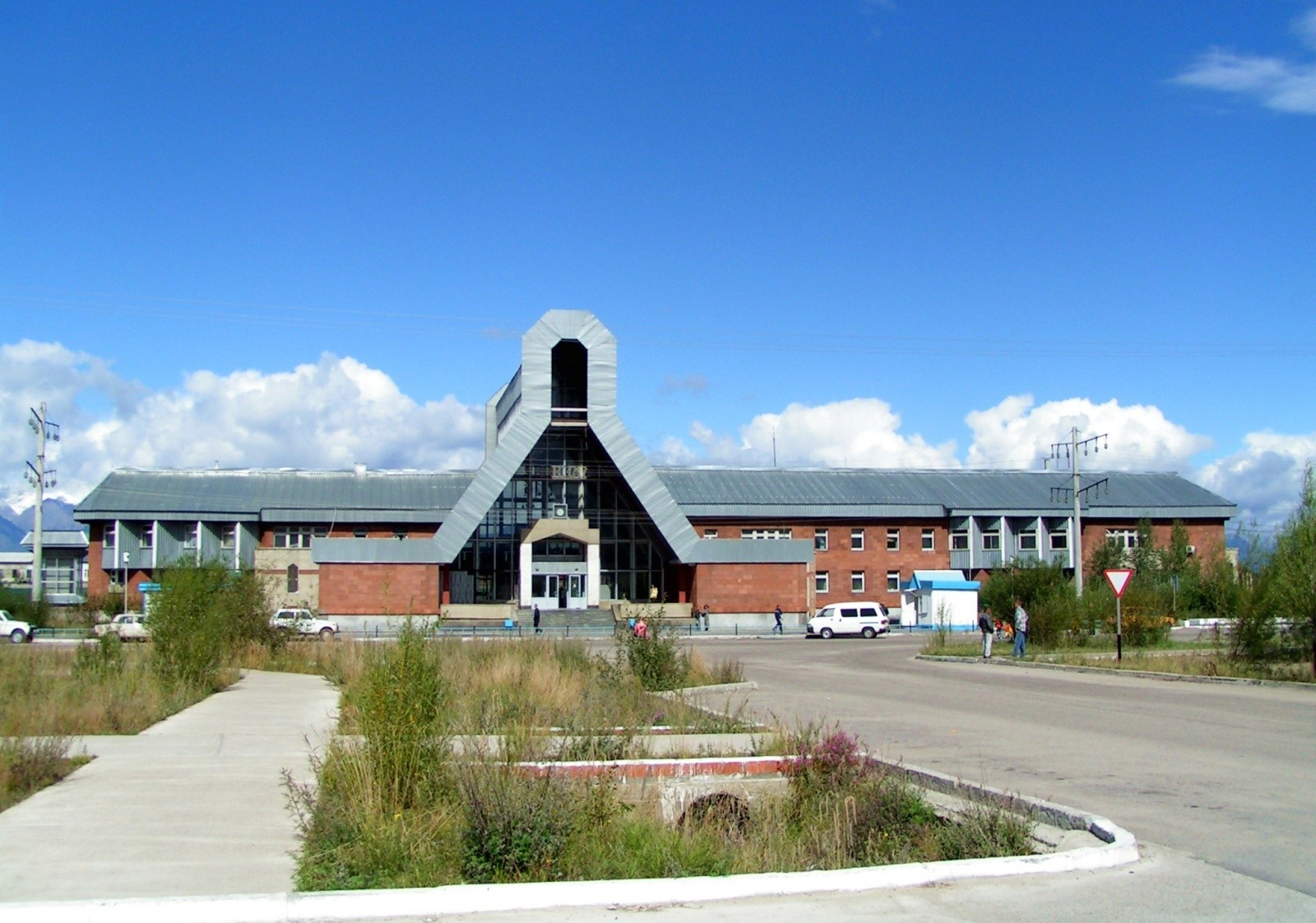 Пгт Новая Чара, Забайкальский край, РФ. Железнодорожный вокзал